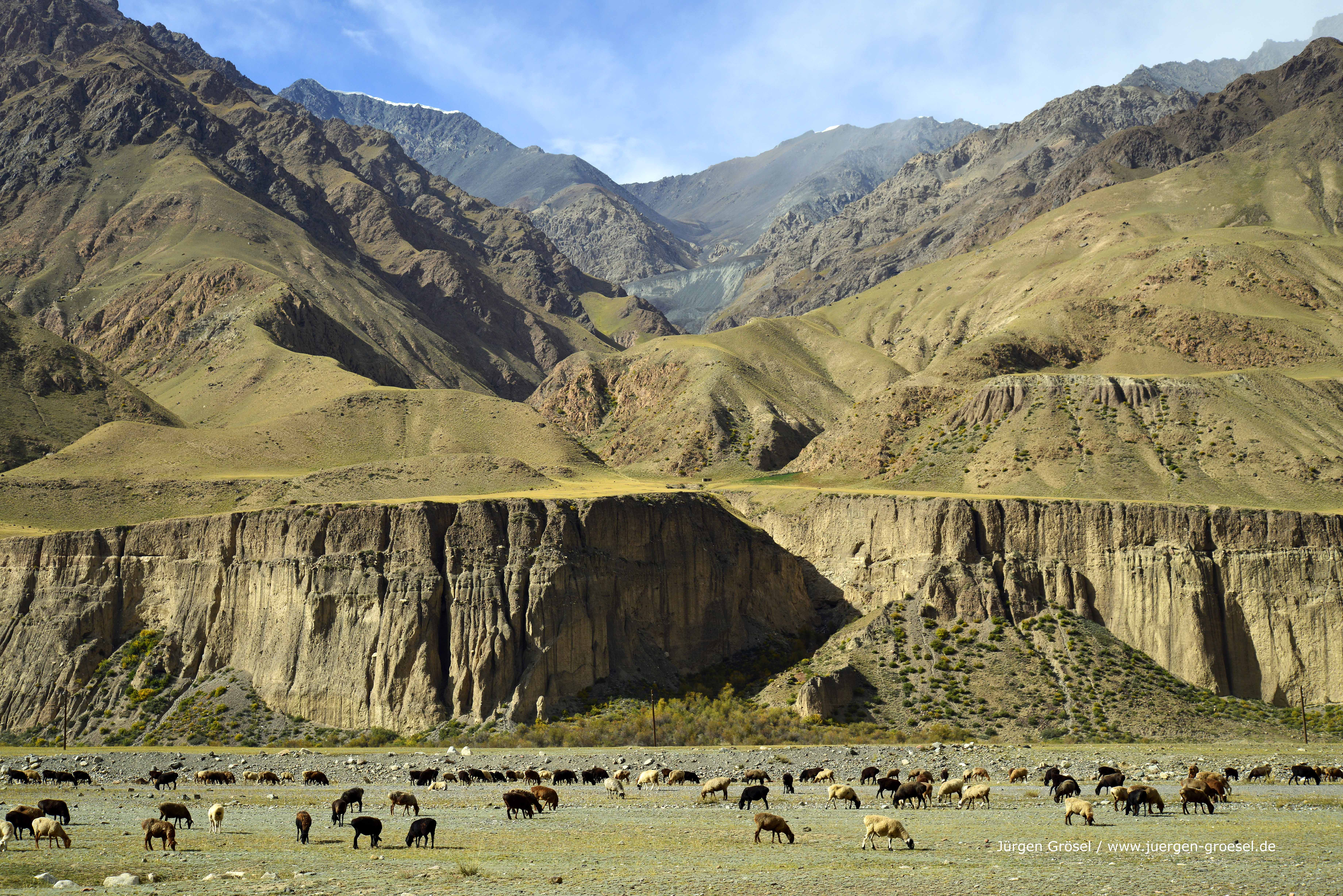 Bei Inylchek im Herbst 2016